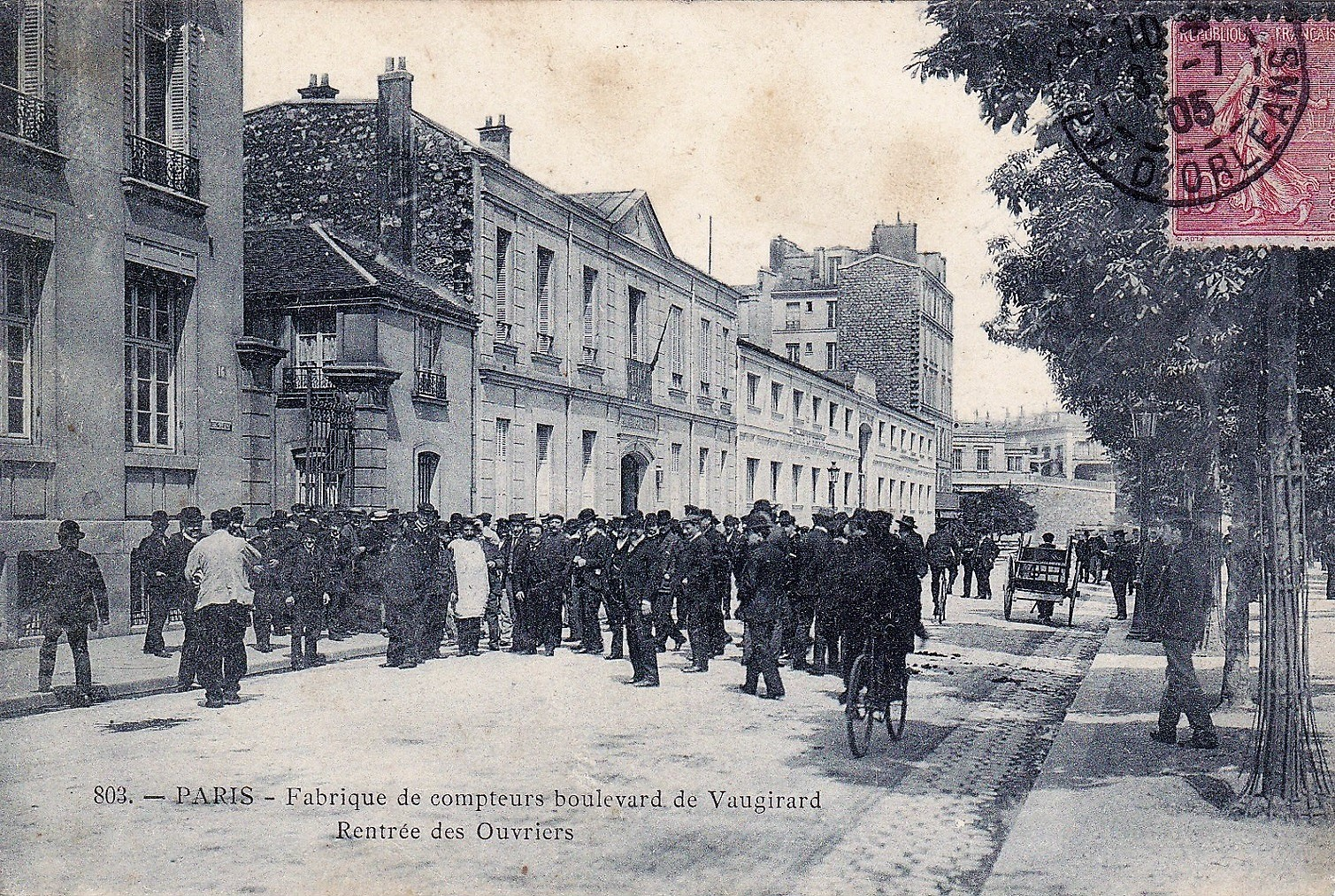 Carte postale - 803 - Paris - Fabrique de compteurs boulevard de Vaugirard, Rentrée des Ouvriers